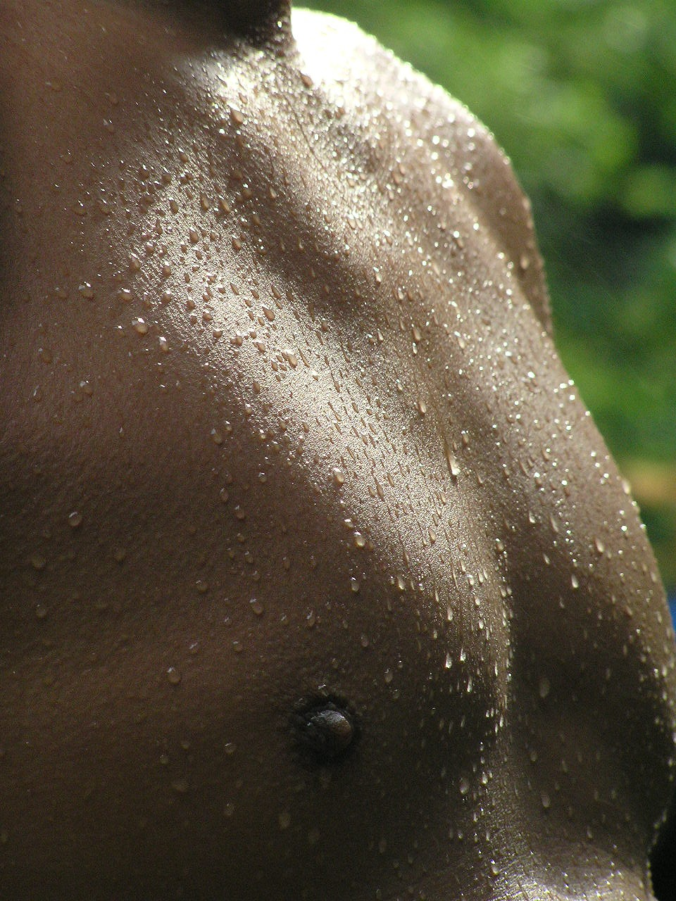 男の胸